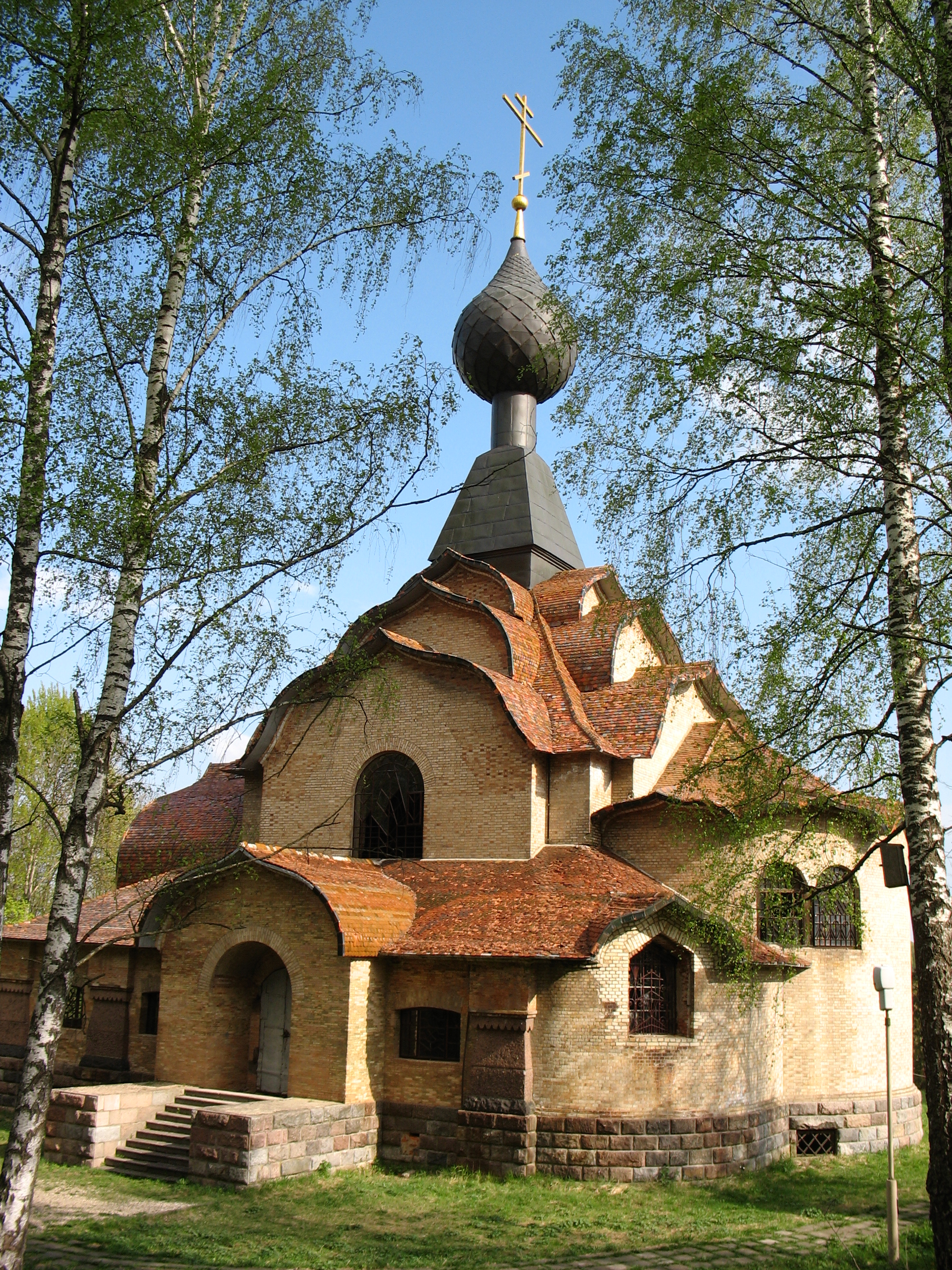 Церковь Святого Духа на территории бывшей усадьбы Тенишевых - Талашкино